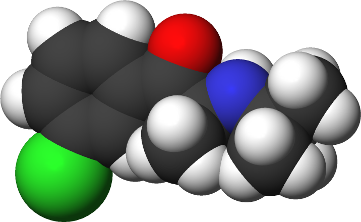 Bupropion